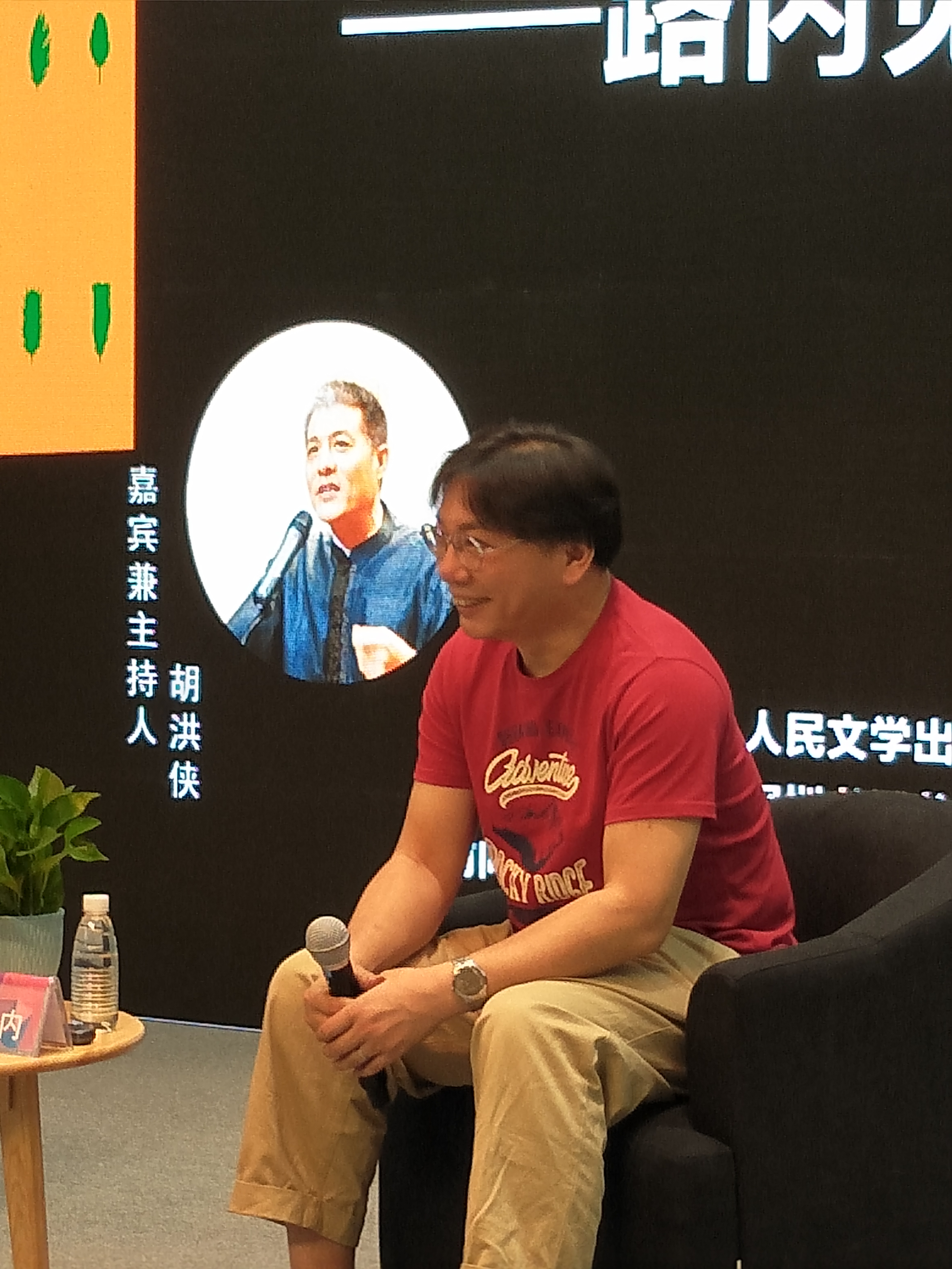 作家路内，2018年7月18日于深圳。